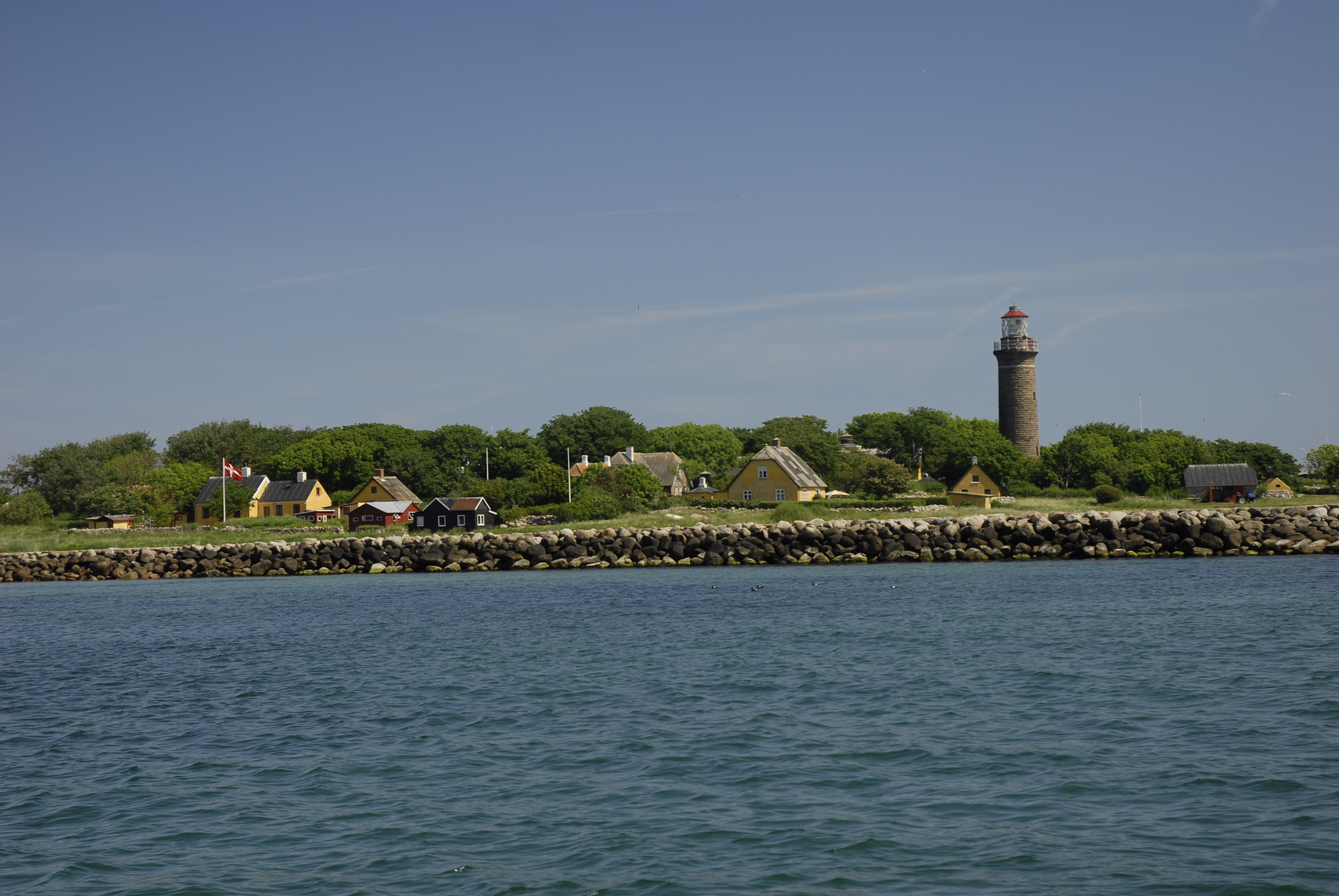 Hirsholmenes hovedø set fra Kattegat - (vest mod øst). Hirsholm fyr kan også ses. Foto: Morten Bjerregaard 11/6 2007;Cc-by-sa-2. Tilladelser: Gengivelse med kildeangivelse til alle formål